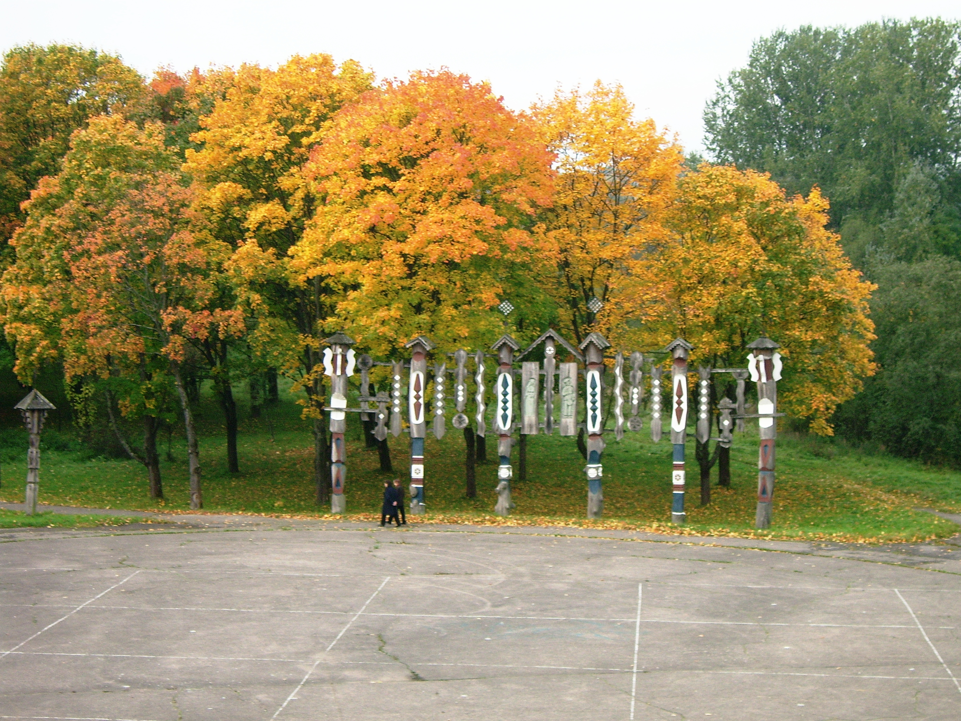 Tauragės estrada